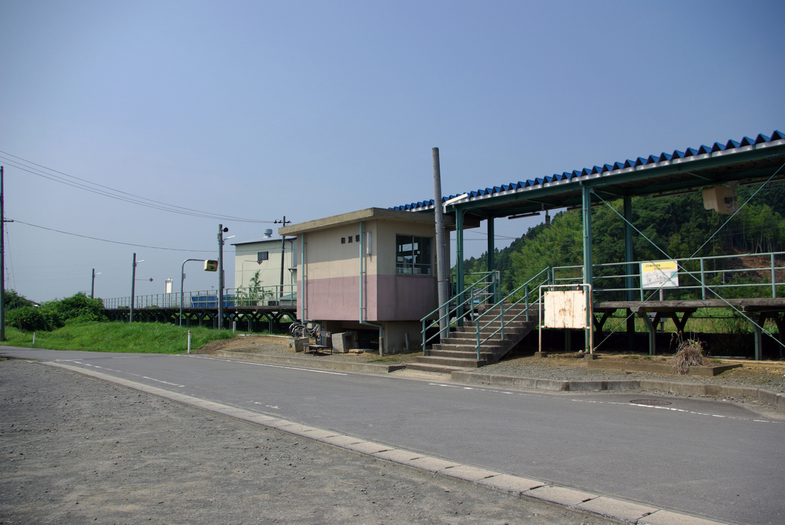 JR気仙沼線和渕駅